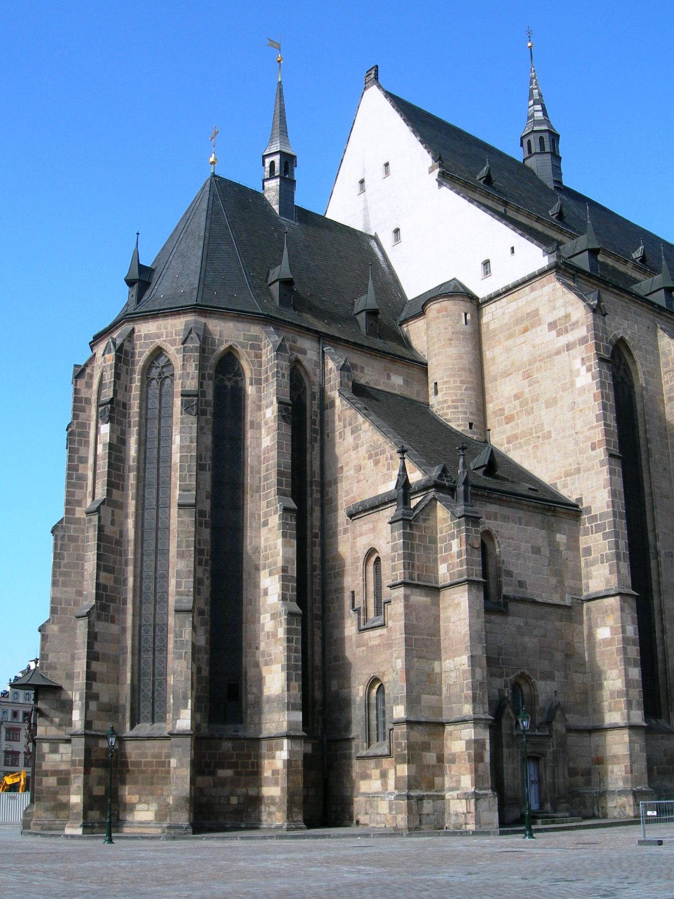 Plzeň Sv. Bartoloměj, presbyterium (cca 1350)